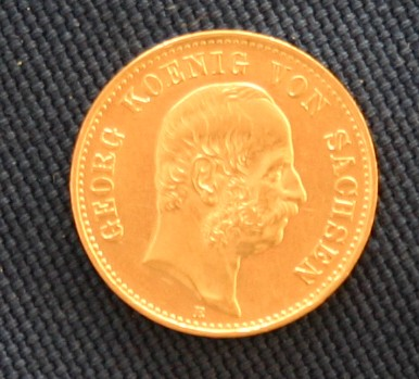 20 Goldmark Georg König von Sachsen (1902-1904)